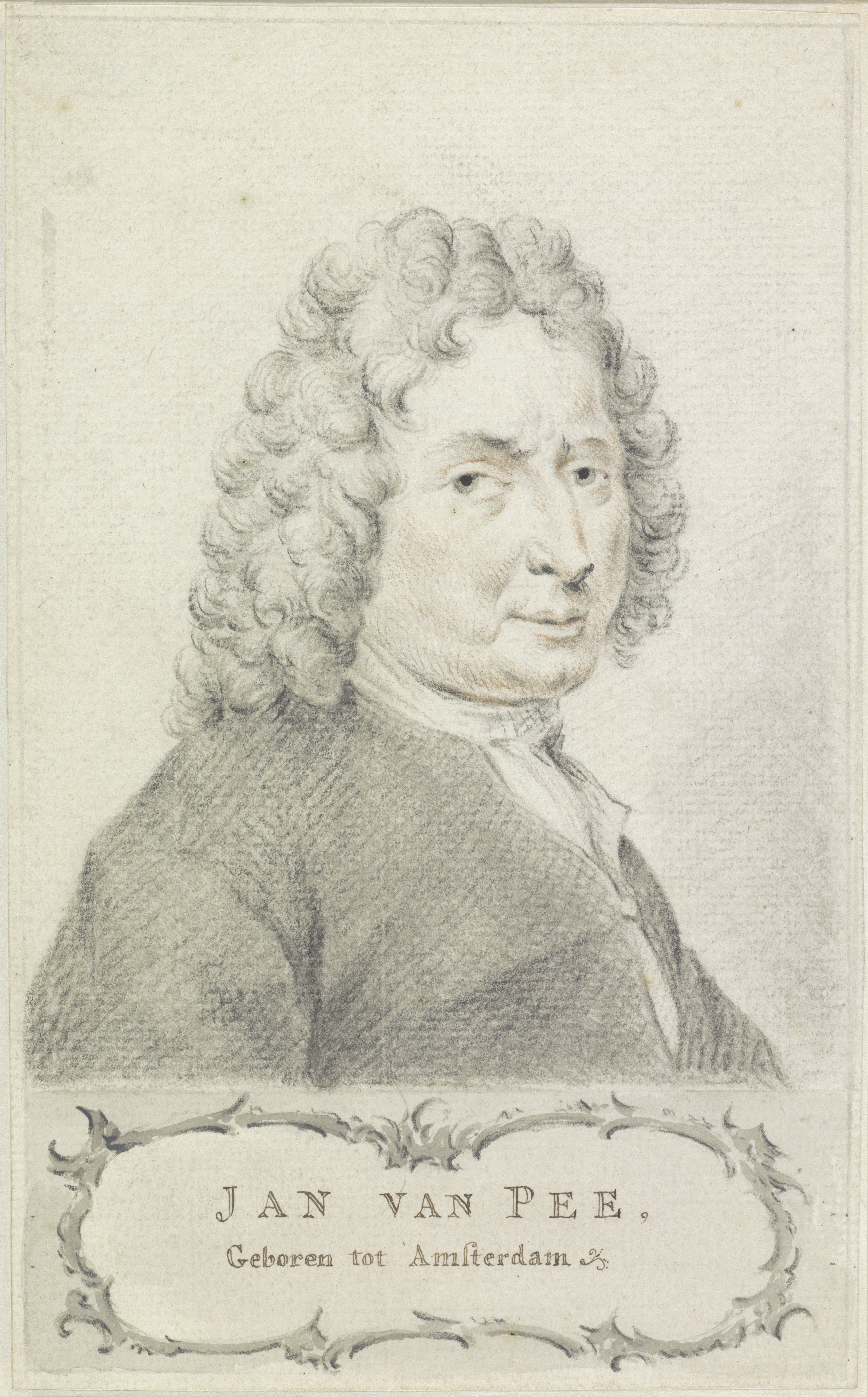 IdentificatieTitel(s): Portret van Jan van PeeObjecttype: tekening Objectnummer: RP-T-1940-374VervaardigingVervaardiger: tekenaar: anoniemDatering: ca. 1630 - ca. 1760Fysieke kenmerken: pen in bruin, penseel in grijs, zwart en rood krijtMateriaal: papier inkt krijt Techniek: pen / penseelAfmetingen: h 199 mm × b 122 mmOnderwerpWat: portrait, self-portrait of artisthistorical person (PEE, Jan van) - historical person (PEE, Jan van) portrayed aloneWie: Jan van PeeVerwerving en rechtenCredit line: Aankoop uit het F.G. Waller-FondsVerwerving: aankoop 1940Copyright: Publiek domein